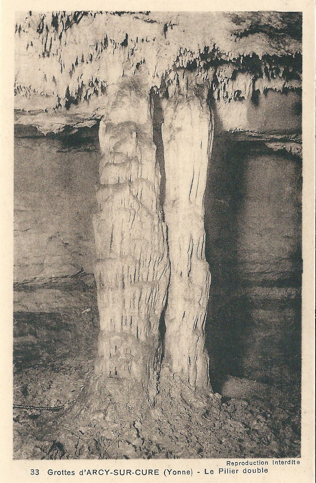 Grande grotte, site d'Arcy-sur-Cure, Yonne, Bourgogne, France : concrétion nommée "le Pilier double". Carte postale, vers 1937 (et avant 1939)